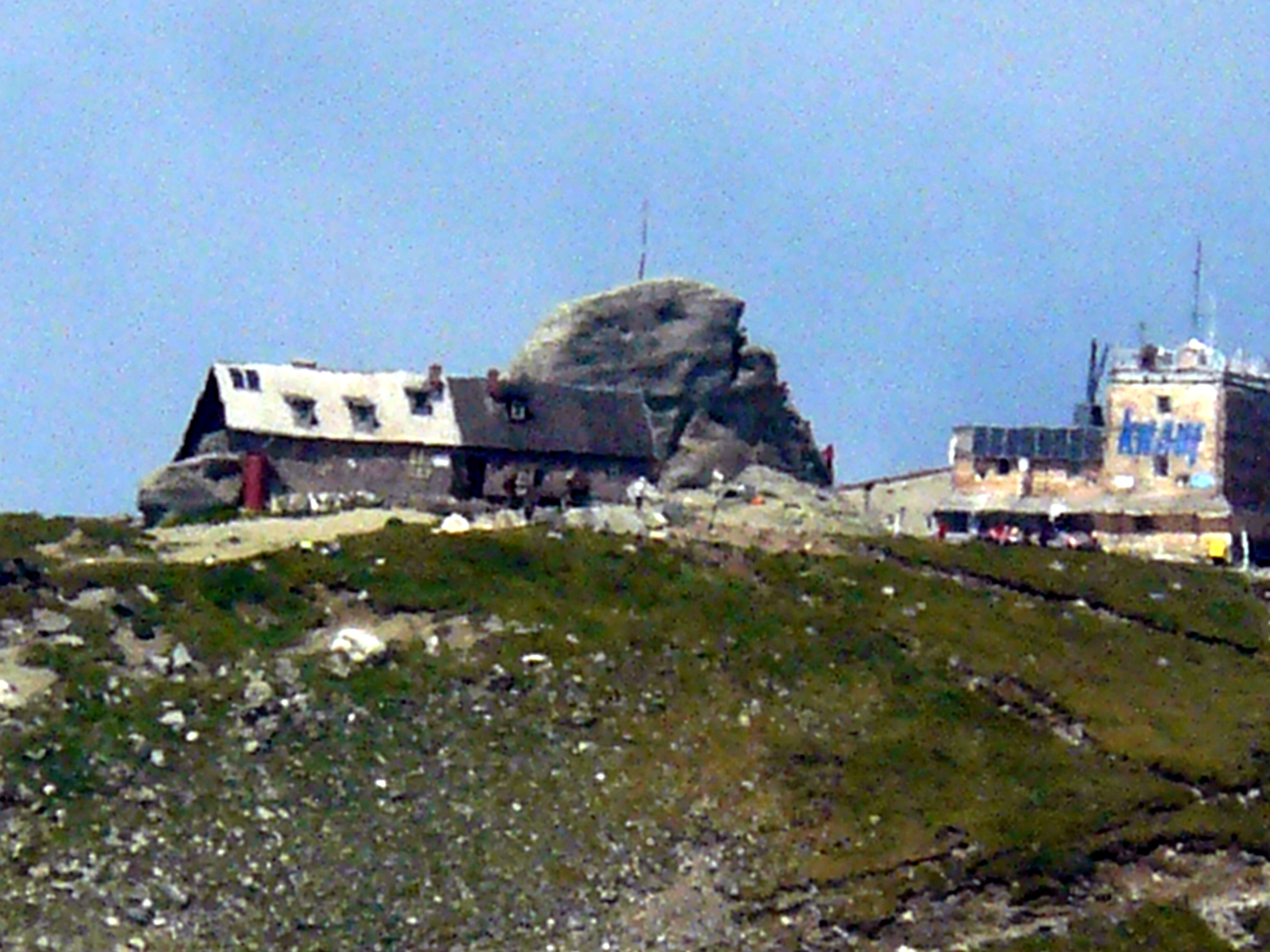 Sinaia - Cota 1400 - Cota 2000 - Cabana Valea Dorului - Cabana Diana - Manastirea Ialomicioarei - Babele - Vf. Omu (Cabana Omu) - Valea Cerbului - Busteni